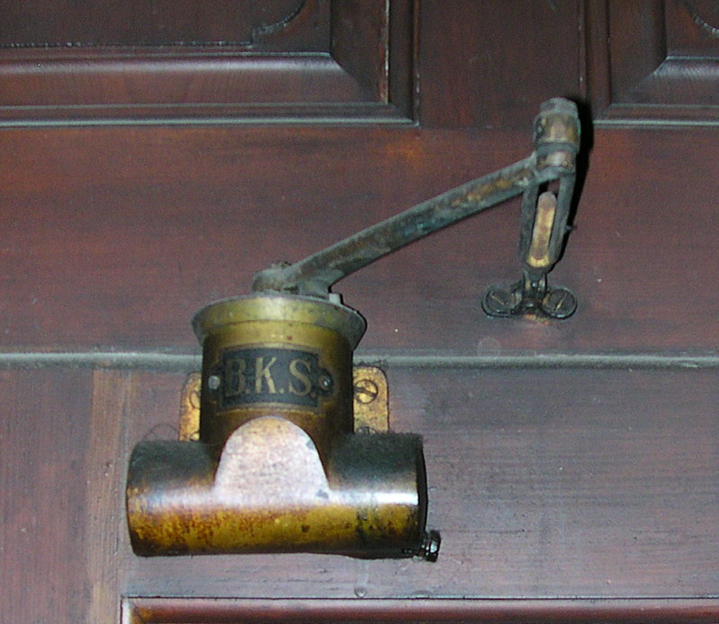 alter Gelenkarm-Türschließer der Firma B.K.S. aus Velbert, gesehen im Wormser Rom